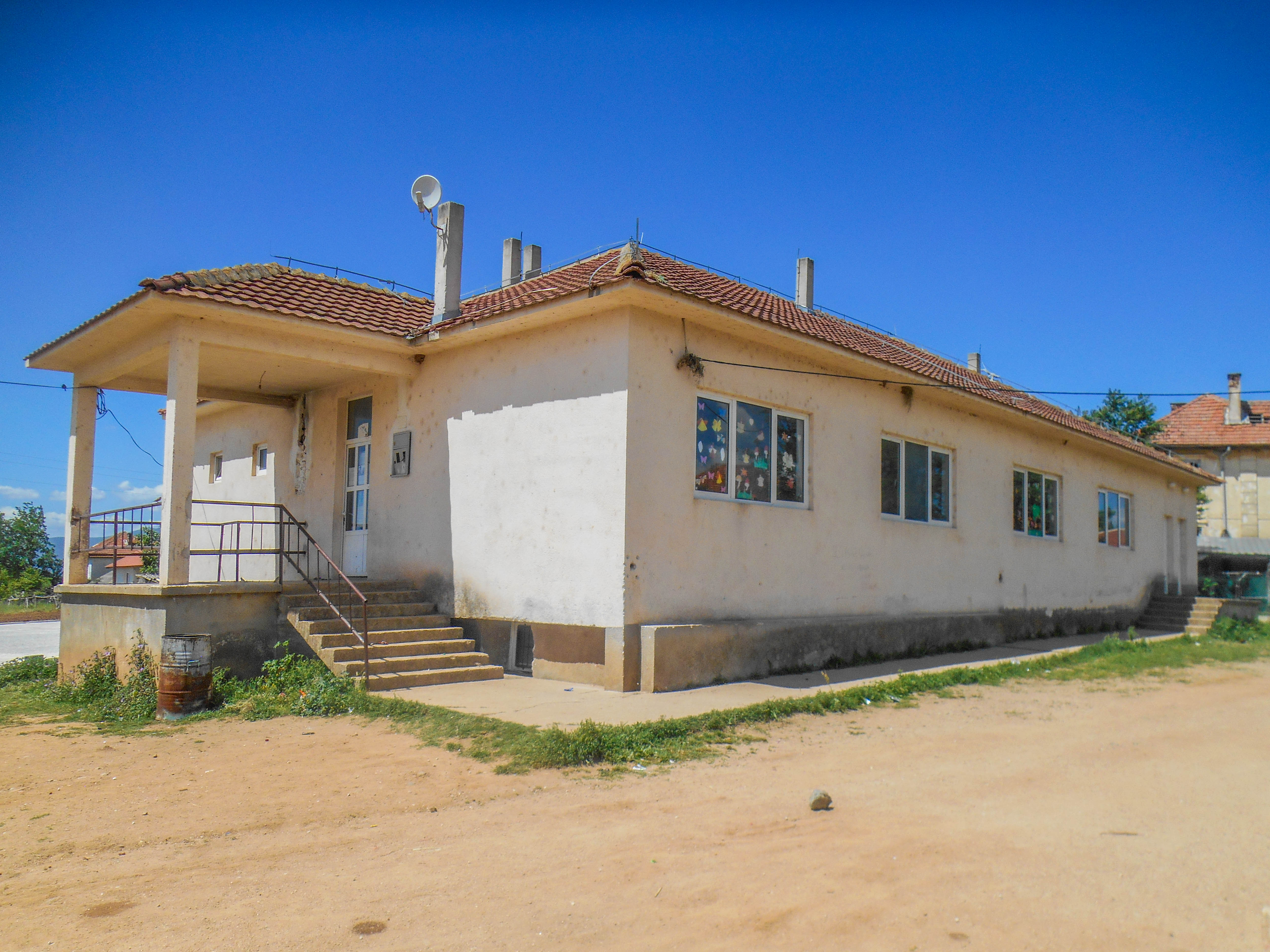 Основно училиште „Атанас Нивичански“ - Доброшинци